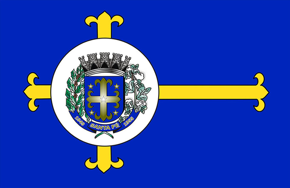 Bandeira do município de Santa Fé, Paraná, Brasil.